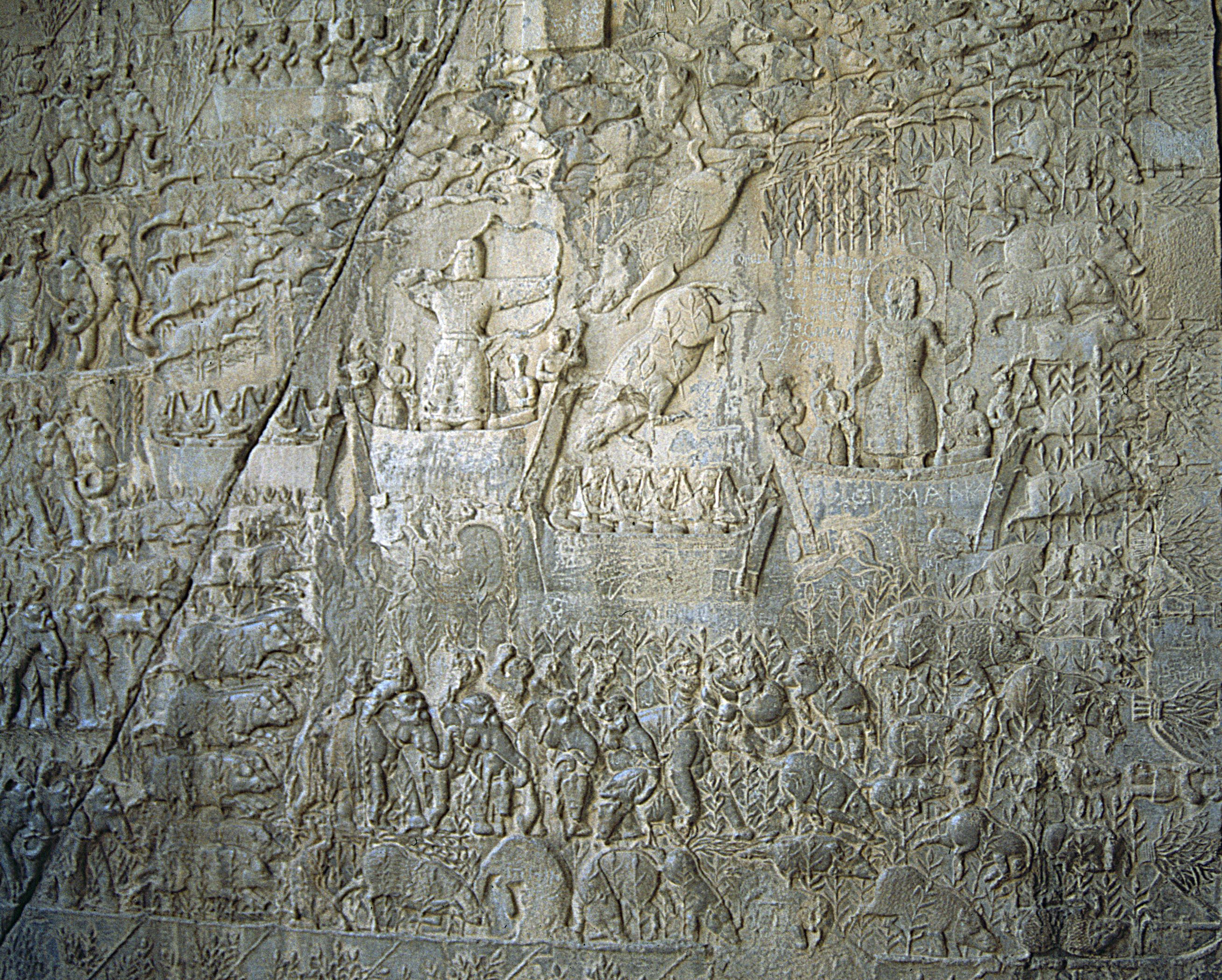 Taq-i-Bustan, Eberjagd von Khosrow II.